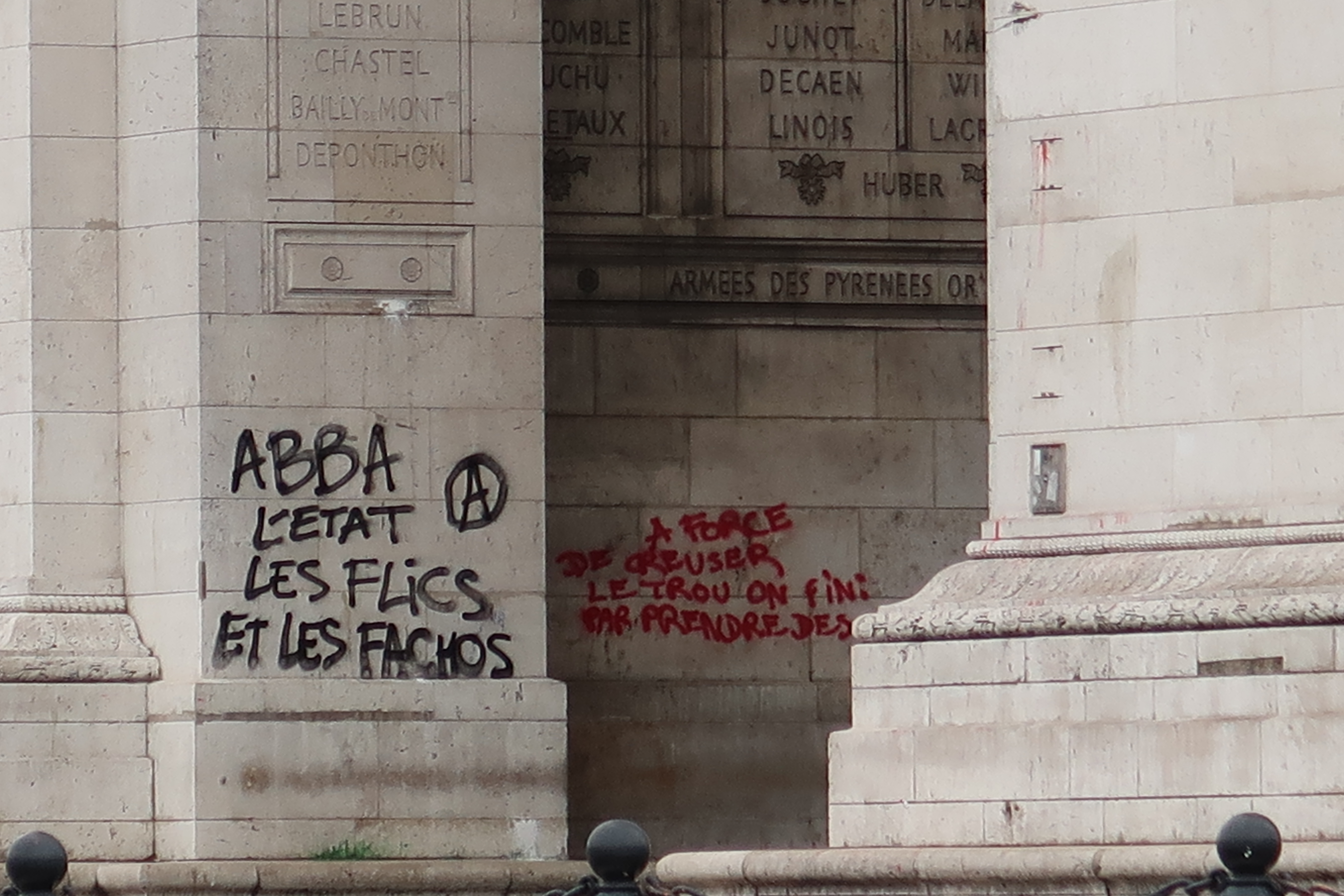 Arc de Triomphe, place Charles-de-Gaulle (Paris). Photo prise le lendemain de la manifestation du mouvement des Gilets jaunes du 1er décembre 2018.